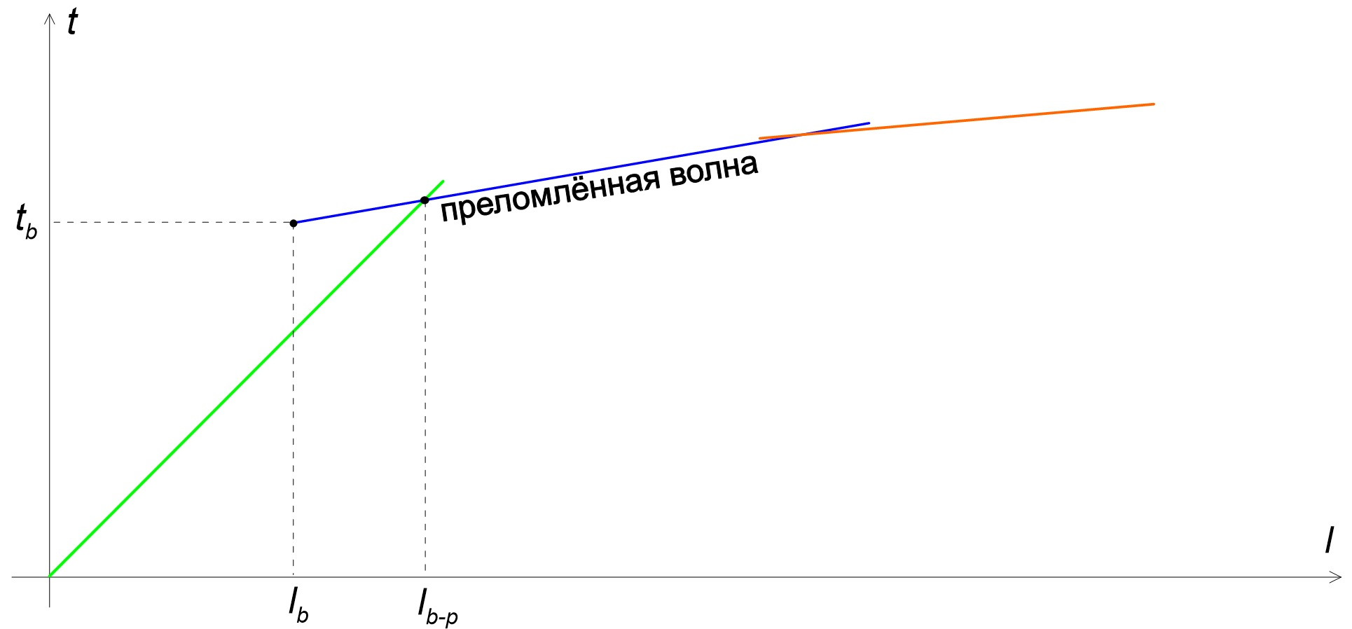 Годограф рефрагированной волны